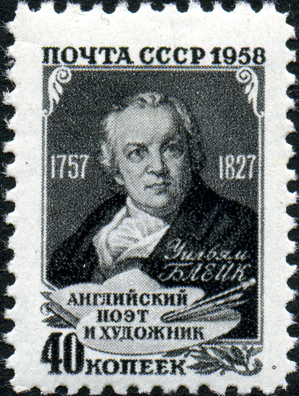 Марка СССР